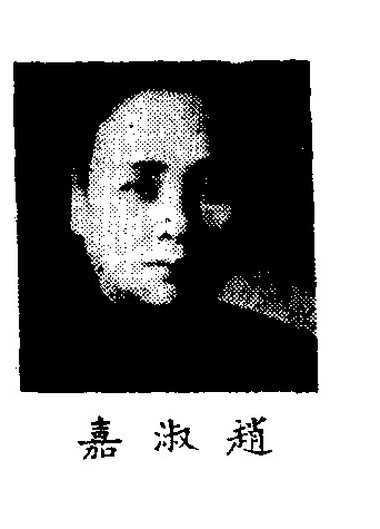 中文（中国大陆）: 制憲國民大會代表